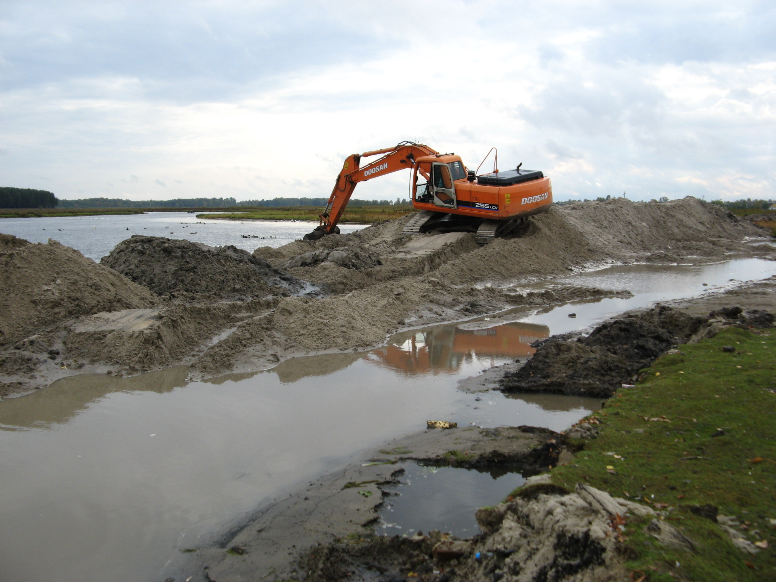 Будівництво дамби в Любешові на р. Стохід на території національного парку